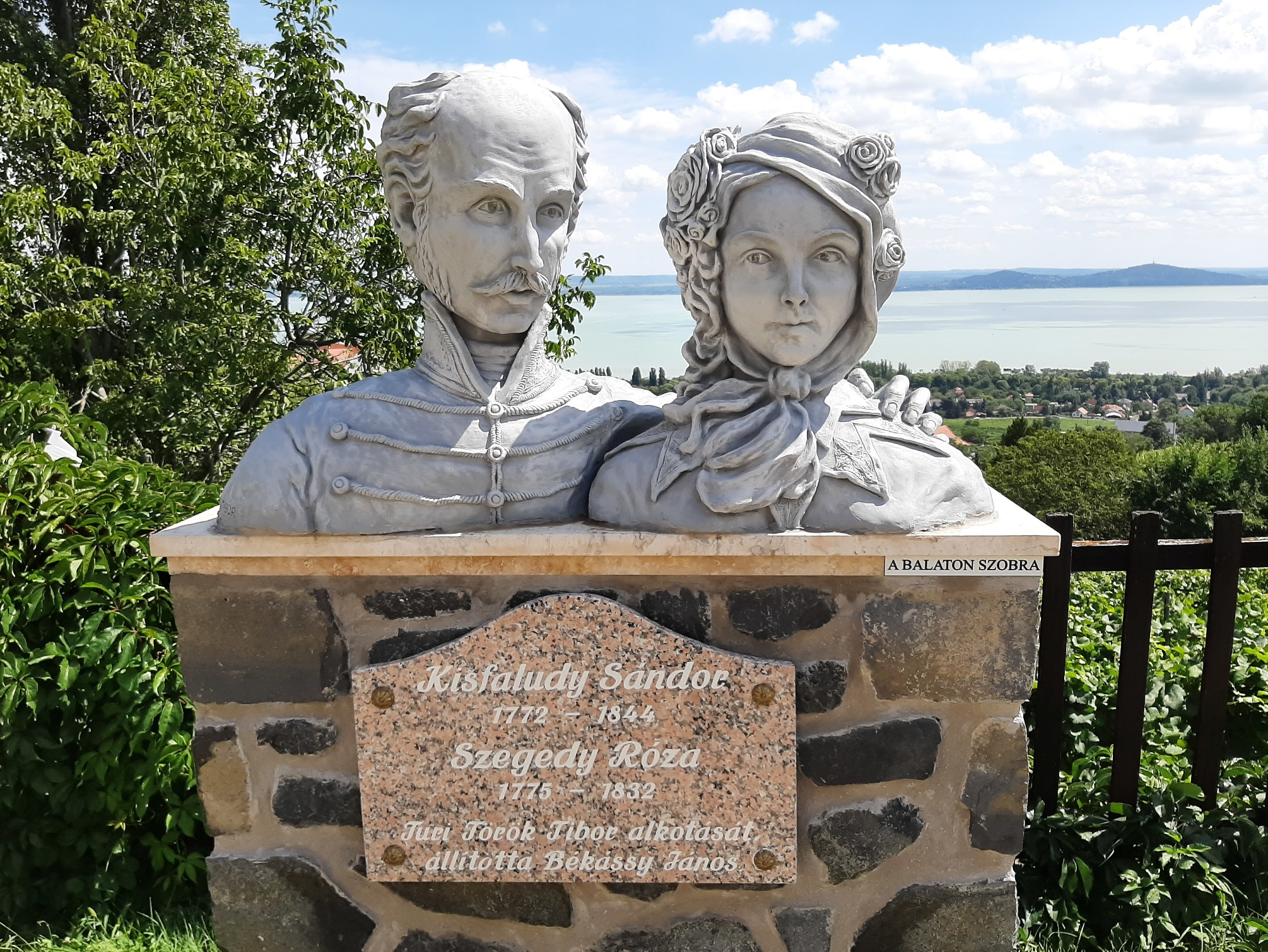 Kisfaludy Sándor és Szegedy Róza mellszobra Badacsonytomajon, Szegedy Róza házában. Túri Török Tibor alkotása